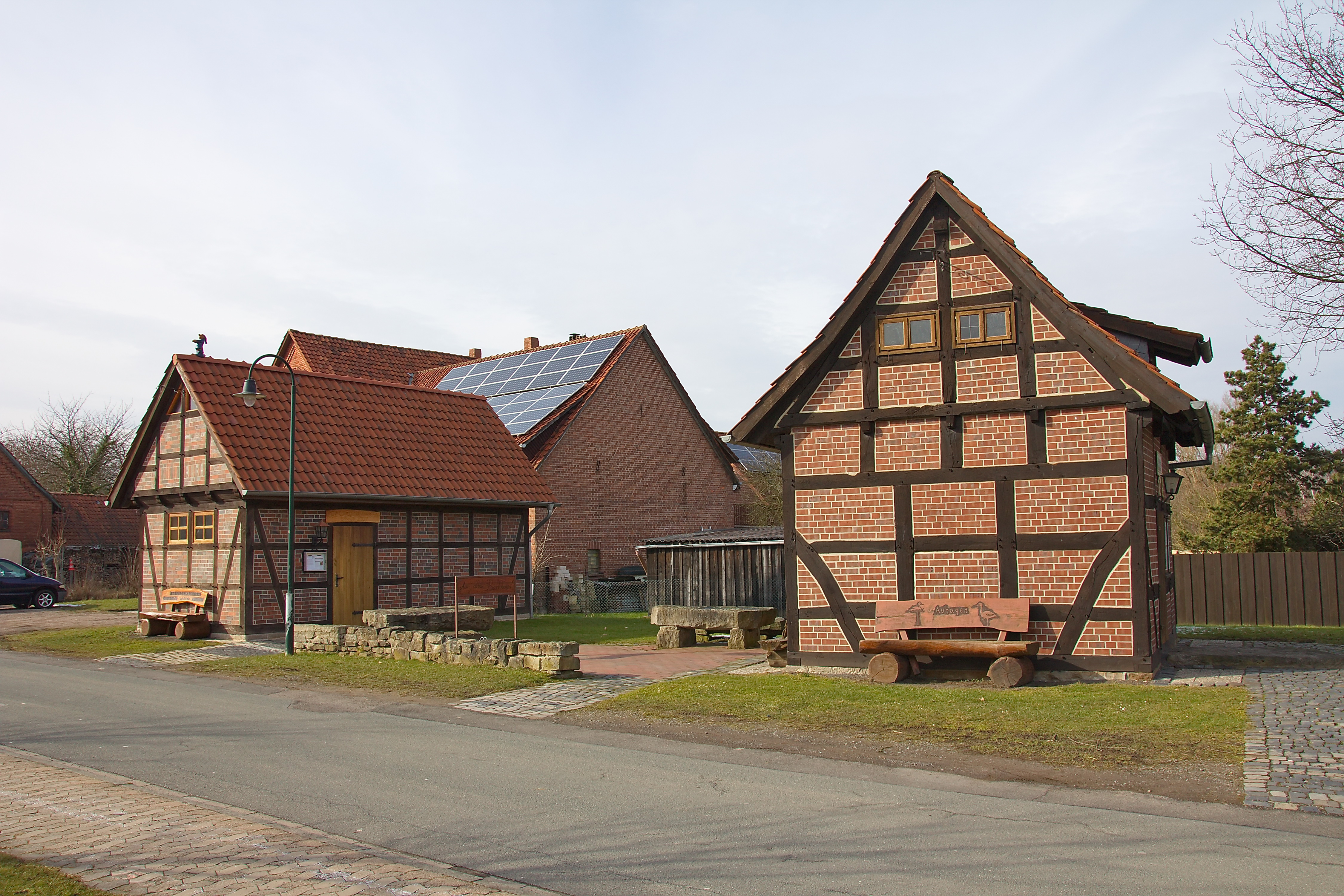 Ortsblick in Auhagen, Niedersachsen, Deutschland